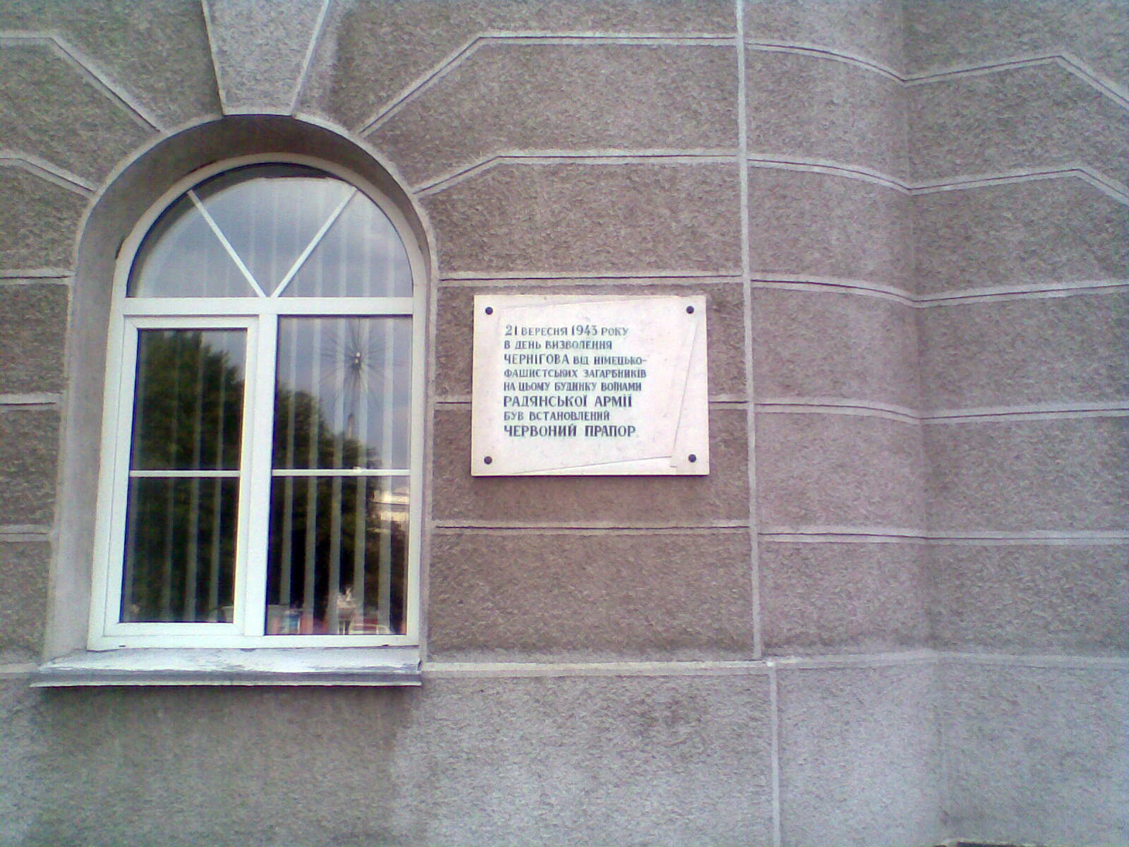 Чернигов был временно оккупирован немецко-фашистскими захватчиками в период с 9 сентября 1941 года по 21 сентября 1943 года.